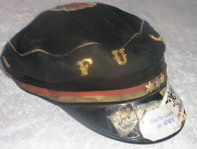 Penne Consulaire portée par les membres du CEFUC (Cercle Etudiant des Fucam)